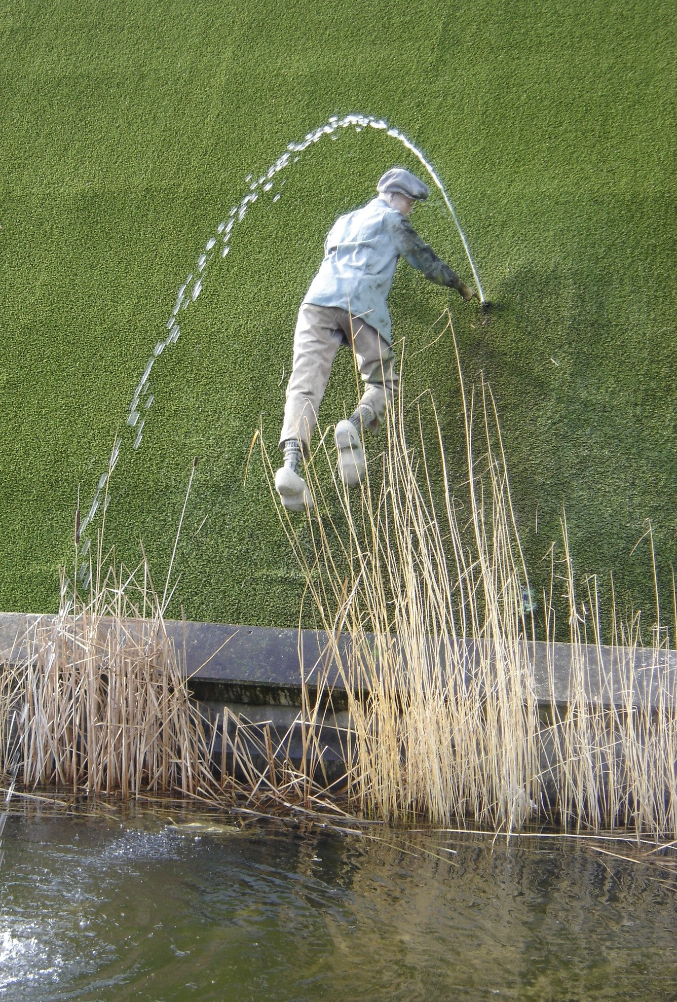 Hans Brinker, Madurodam, february 19, 2006